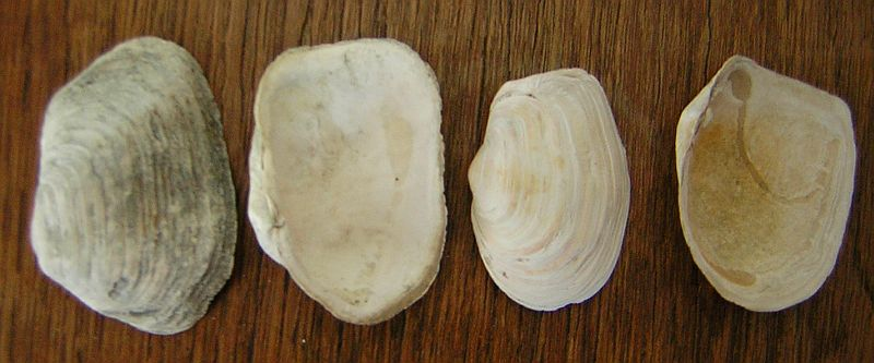 Beispiel für Konvergenz bei Muscheln rechts: Mya truncata Gestutzte Klaffmuschel deutsche Nordseeküste links: Felsklaffmuschel Panopea glycymeris aus Norwegen